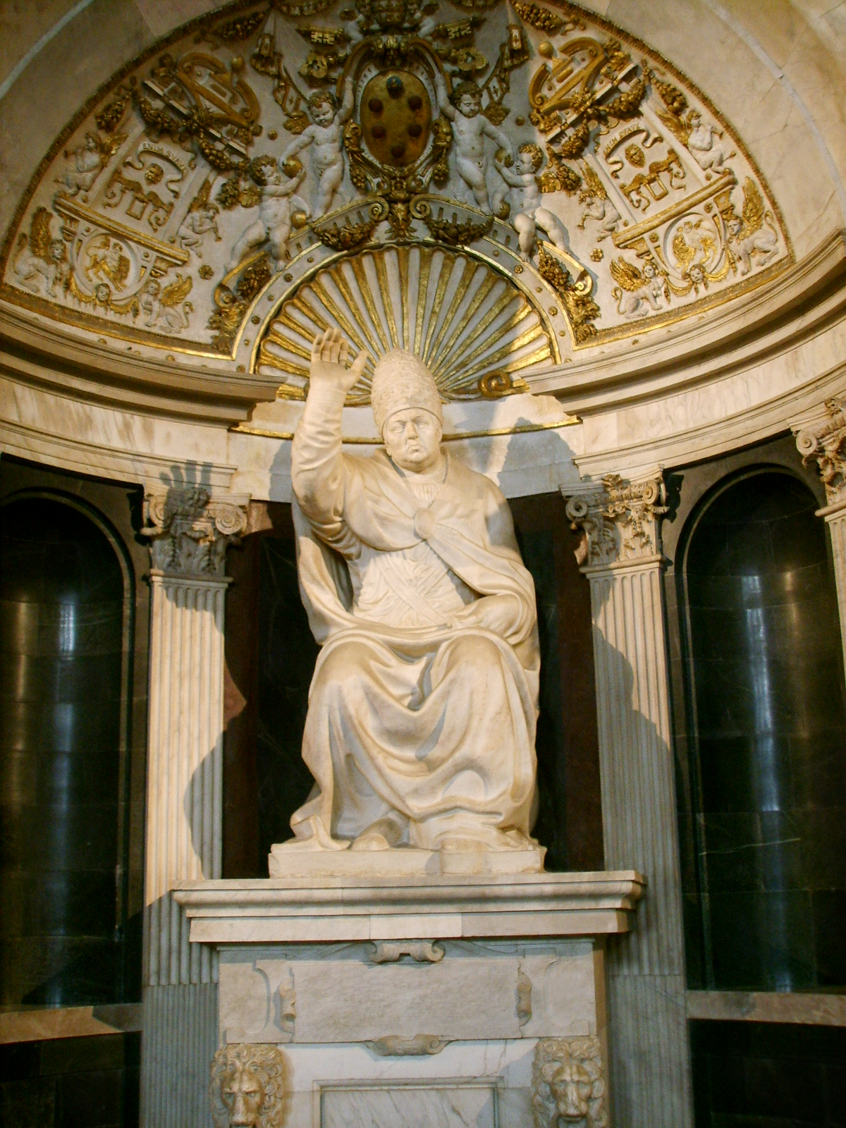 Palazzo vecchio, baccio bandinelli e vincenzo de' rossi, leone X